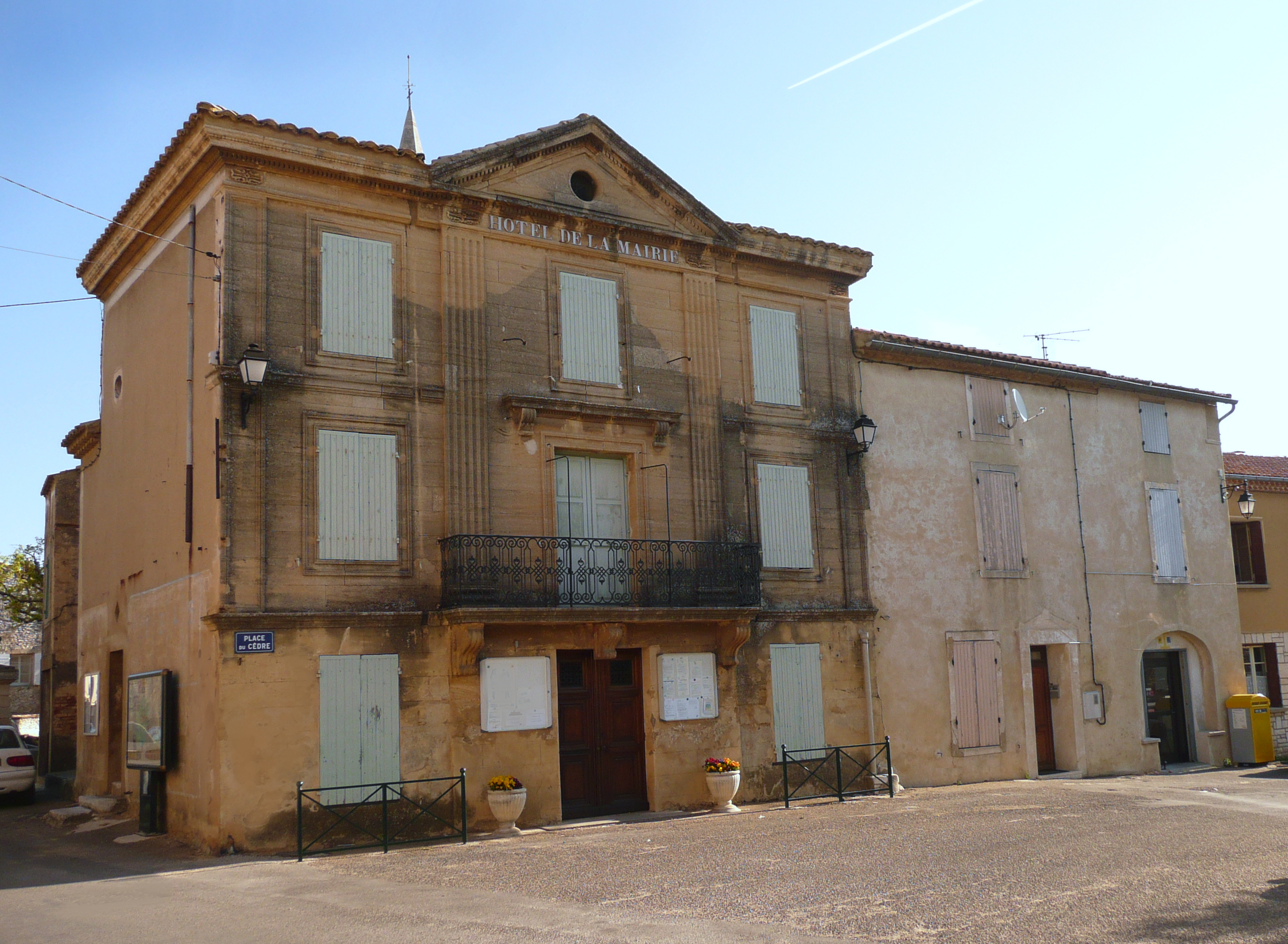 Hôtel de la mairie à Lirac.